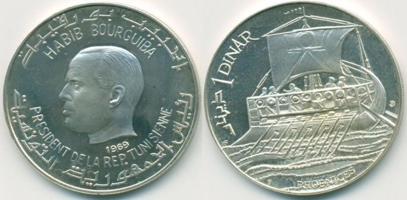 Pièce de 1 dinar tunisien (pièce commémorative), Tunisie